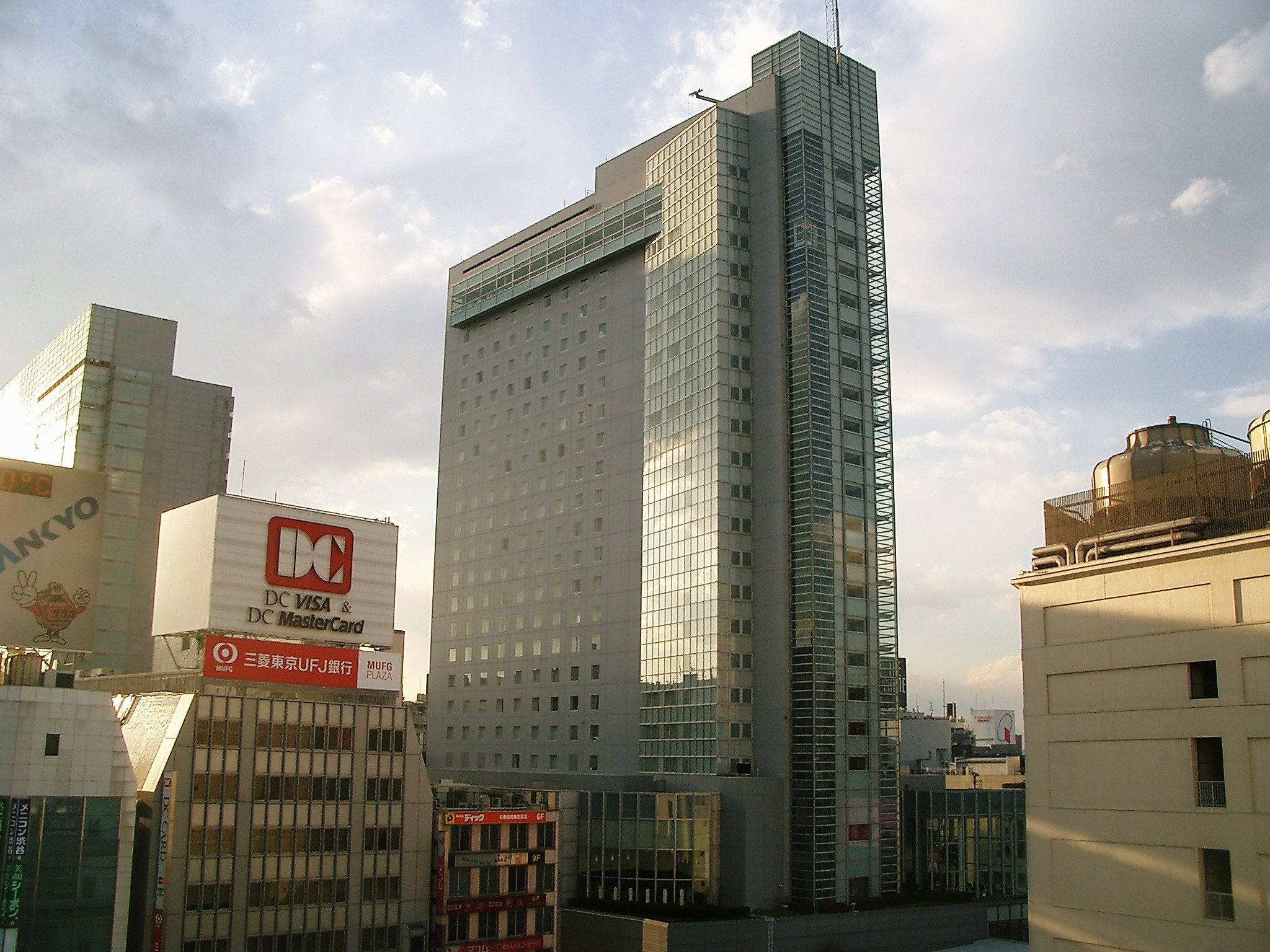 Shibuya Mark City 渋谷マークシティEAST棟を東急百貨店東横店南館の屋上から撮影